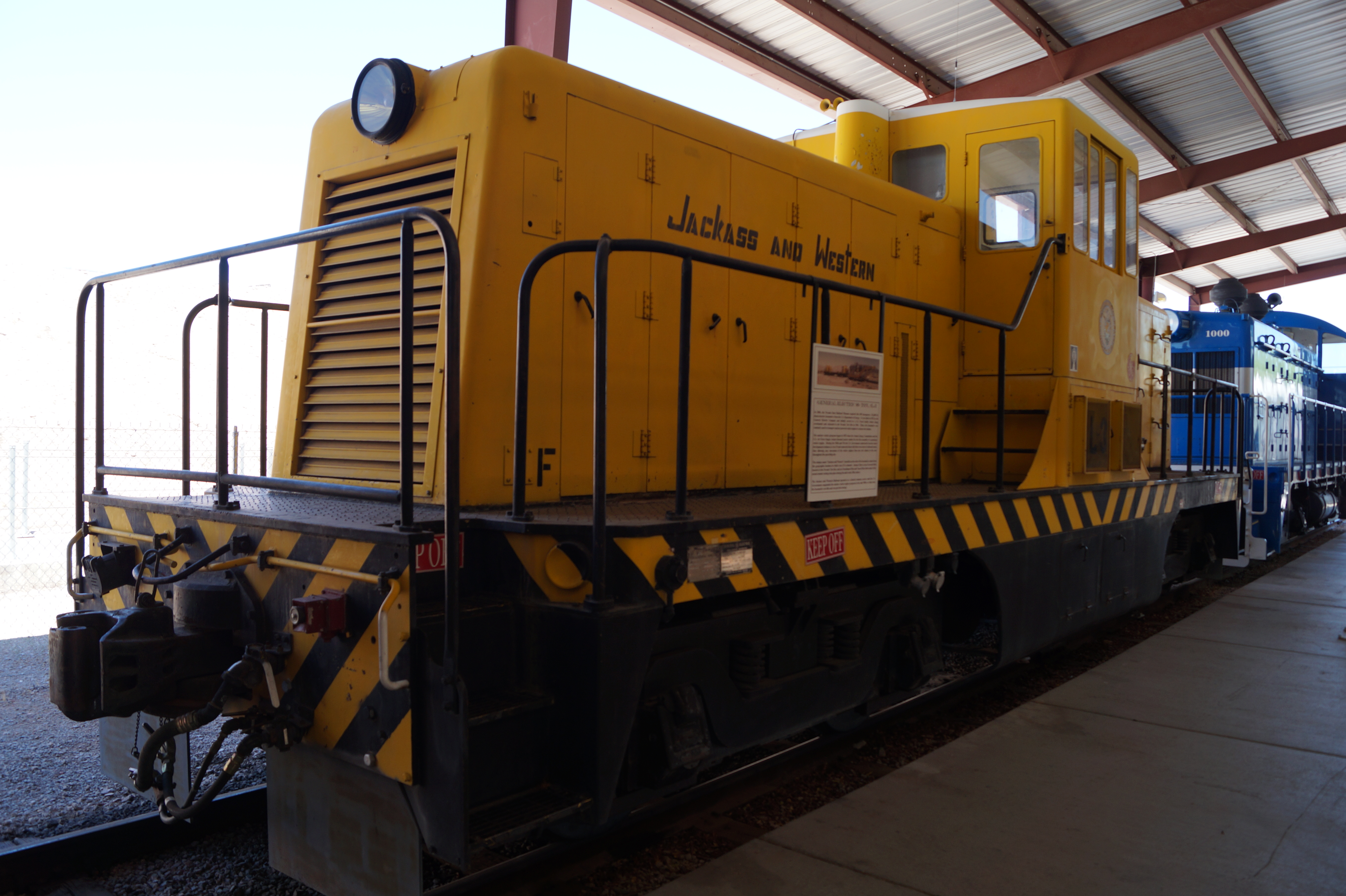 Jackass & Western diesel locomotive at the Nevada State Railroad Museum, which is an agency of the Nevada Department of Cultural Affairs. It is located at Yucca Street on the tracks of the historic Union Pacific Railroad branch Henderson-Boulder City near the former Boulder City Railroad Yards where the Hoover Dam construction equipment was unloaded in the 1930s.